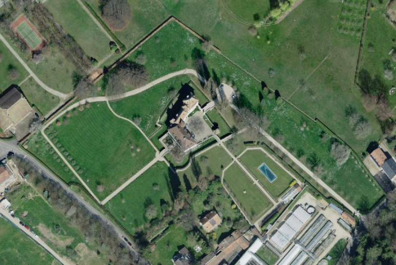 Photo satellite, de Swisstopo, du Château de Tournay, à Pregny-Chambésy (GE), en Suisse.